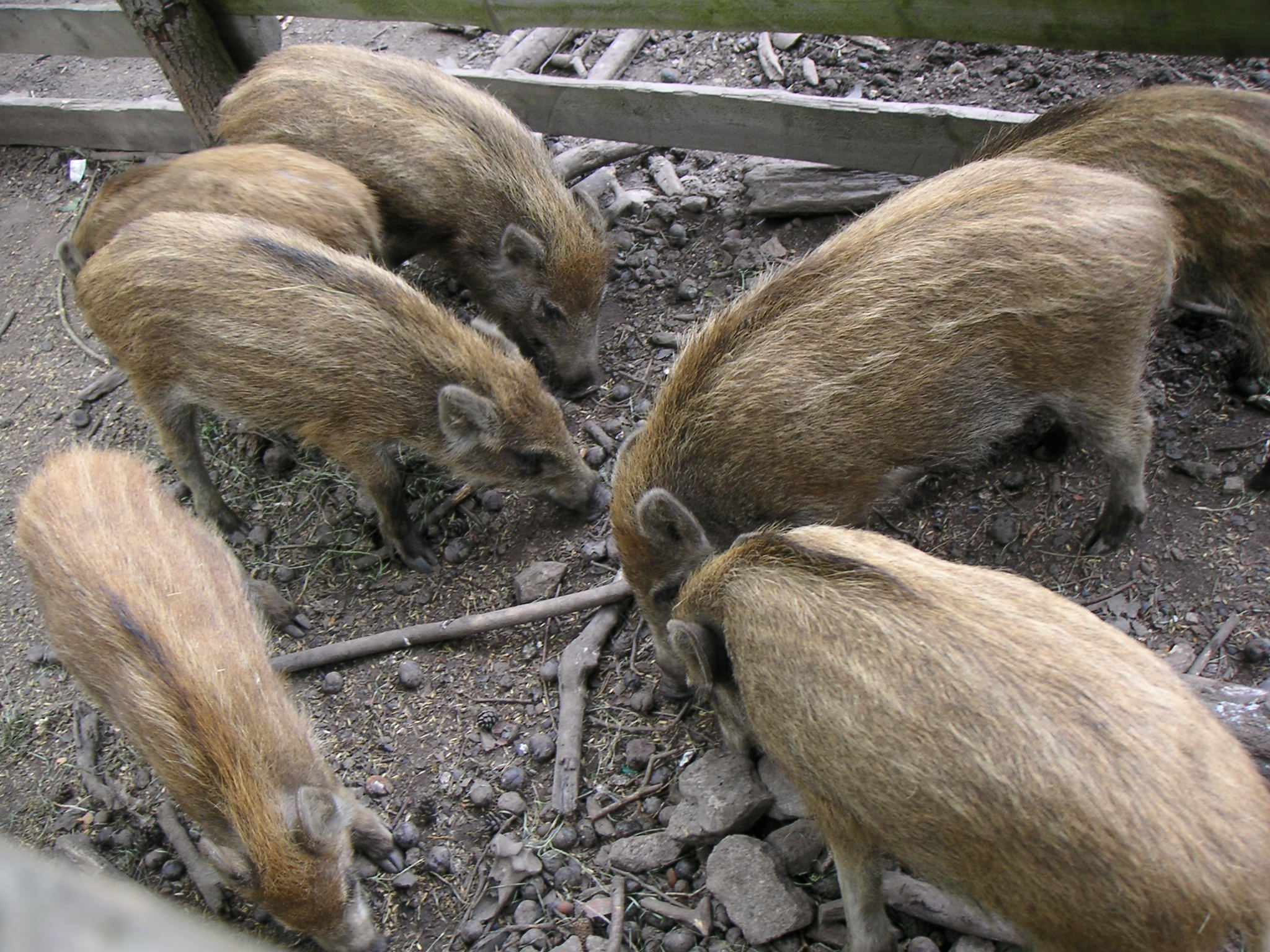 Wildschweine im Wildgehege Moritzburg